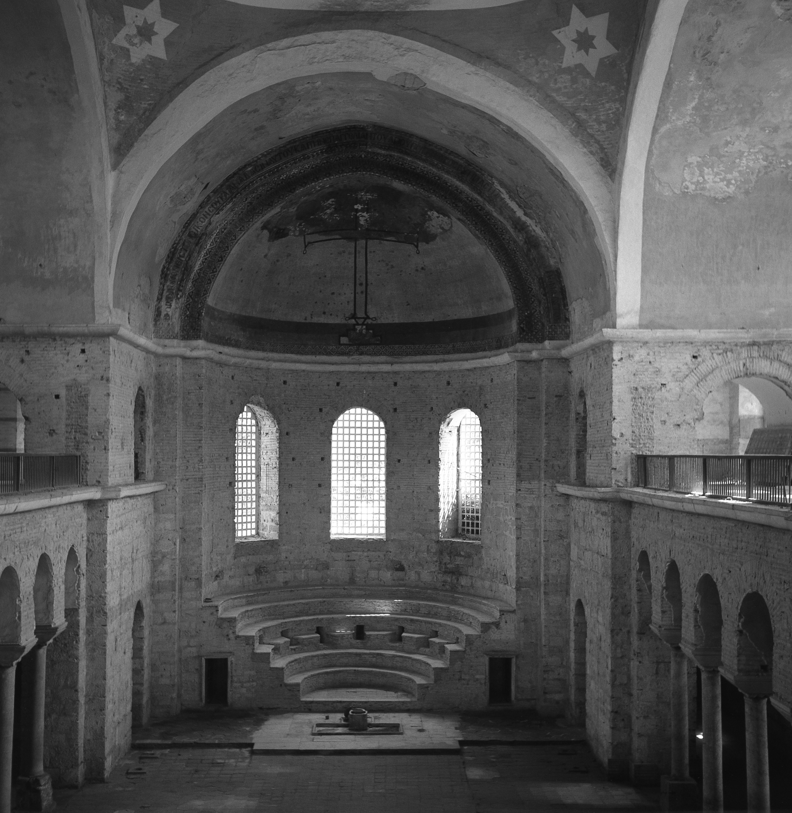 Innenraum der Hagia Eirene, Istanbul.